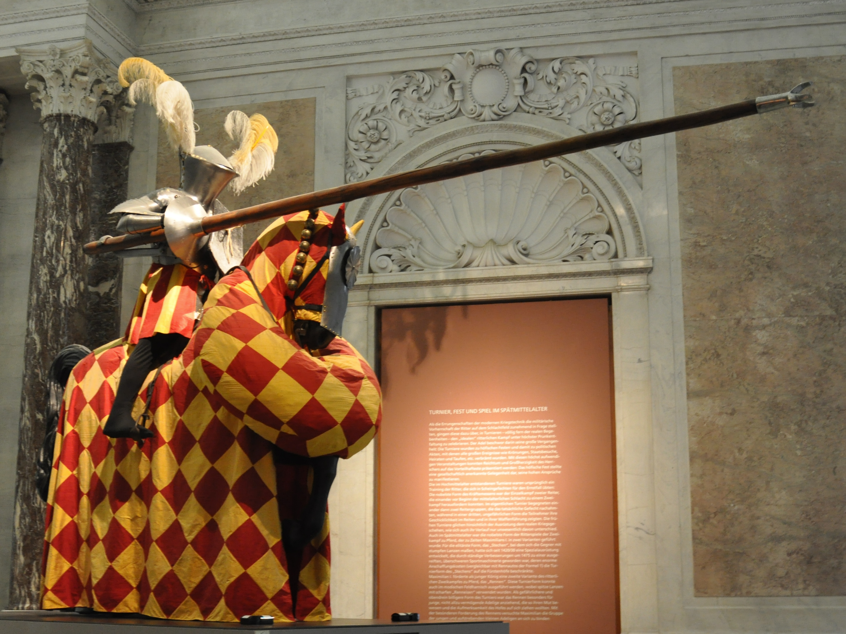 Wien, Kunsthistorisches Museum, Hofjagd- und Rüstkammer (Neue Burg), Inv. Nr. S IX Stechzeug Siegmunds von Tirol (1427–1496), Klaus und Jörg Wagner zugeschrieben, wohl 1483/1484